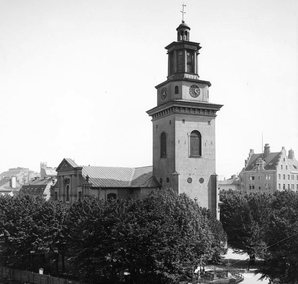 Maria Magdalena kyrka omkring 1900